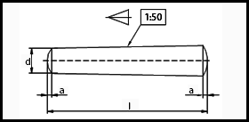 ISO 2339